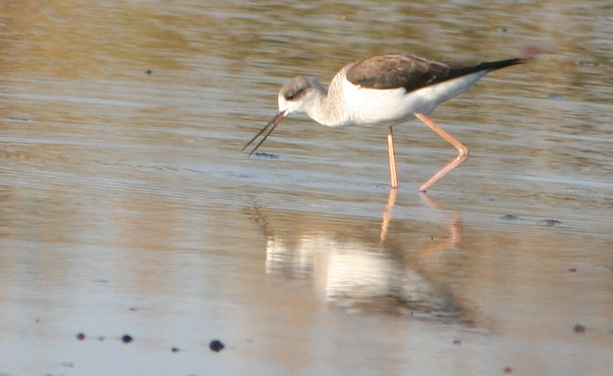 Himantopus himantopus. Himantopus é o género de aves Charadriiformes da família Recurvirostridae que abrange espécies de pernilongo ou perna-longa. Eles possuem as pernas extremamente longas, daí seu nome vernacular, e bicos longos e finos. Se alimentam basicamente de insetos aquáticos e outras pequenas criaturas. Seu habitat preferido são as águas salgadas ou salobras em clima quente ou morno.